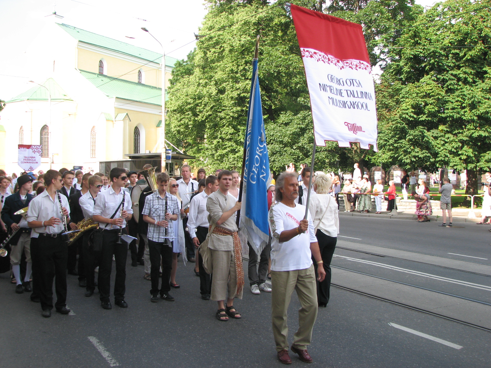 Georg Otsa nimelise Tallinna Muusikakooli esindus XI noorte laulu- ja tantsupeo rongkäigus